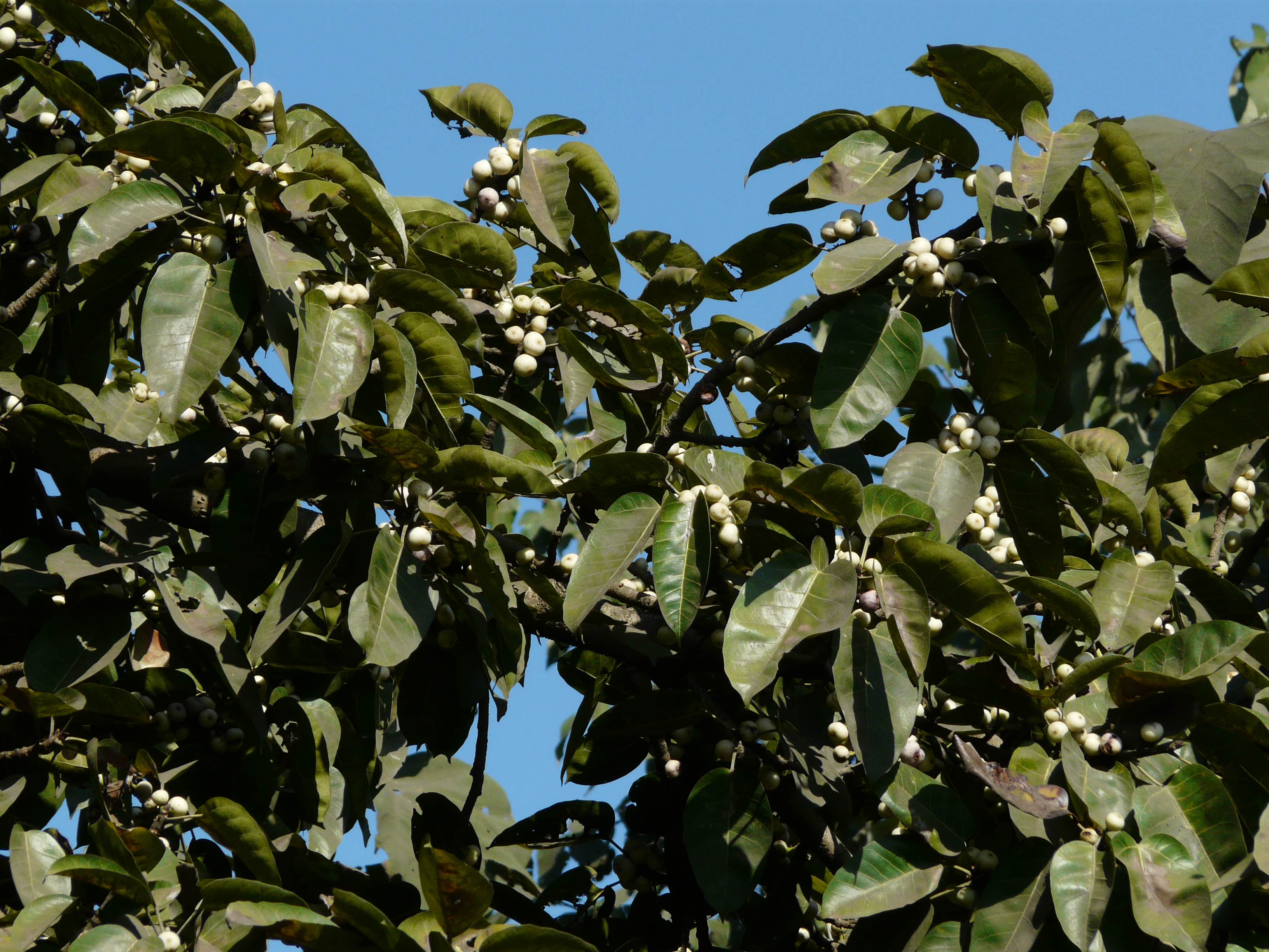 Moraceae (mulberry family) » Ficus virens FY-kus or FIK-us -- from the Latin for fig VEER-enz -- meaning, green commonly known as: grey fig, Java fig, Java willow, sour fig, spotted fig, strangler fig, wavy-leaved fig tree, white fig • Assamese: pakori • Bengali: পাকুড় pakar • Gujarati: પેપરી pepri • Hindi: कमण्डल kamandal, पाकड़ paakar, पाकड़िया paakariya, पर्कटी parkati, पीतन pitan, पिलखन pilkhan, प्लक्ष plaksh, प्लव plav, रामअञ्जीर ramanjir • Jaintia: dieng chiri • Kannada: ಬಸರಿಮರ basarimara, ಕರಿಬಸರಿ karibasari • Khasi: dieng sohpoklaw • Malayalam: ചെറള cherala • Manipuri: চিঙ হৈবোঙ ching heibong • Marathi: लघुपिंपरी laghupimpri, पायर payar, पाईर paiir • Nepalese: safed kabra • Oriya: jari • Punjabi: jangli pipli, palakh, pilkhan • Sanskrit: भिदुरः bhidura, दृढप्रारोहः dridapraroha, हृस्वपर्ण hrasvaparna, जाती jati, मङ्गलछायः mangalachaya, पर्कटी parkati, पीतन pitan, प्लक्षः plaksha, प्लवकः plavaka, शुङ्गिन् shungin,, यवः yavha • Tamil: சிற்றால் chirral, சுவி chuvi, இத்தி itti, கல்லால் kallal, குருக்கத்தி kurukkaththi • Telugu: జువ్వి zuvvi • Urdu: پاکڙيا paakariya Native to: south China, Indian subcontinent, Indo-China, Malesia, north Australia References: Flowers of India • NPGS / GRIN • eFlora • ENVIS - FRLHT • M.M.P.N.D.